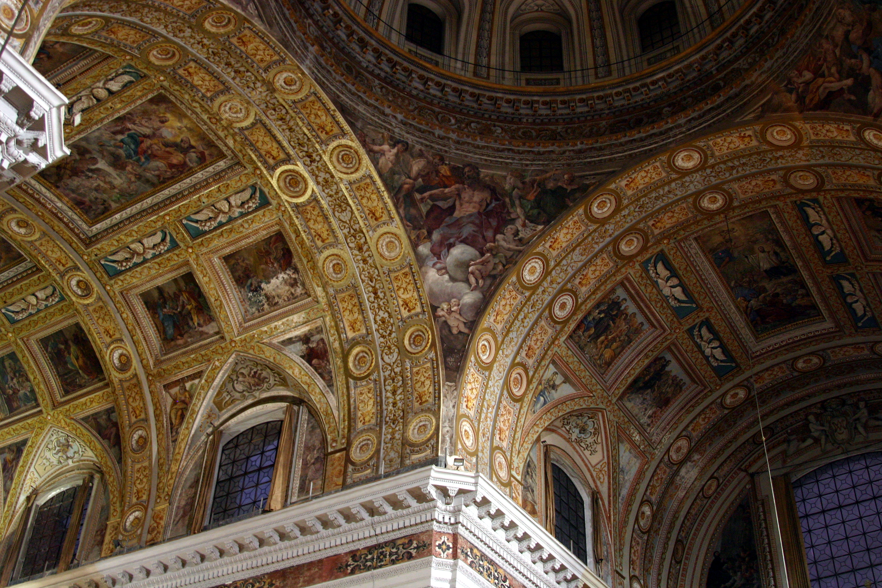 Gesù Nuovo - Naples